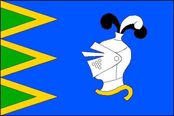 Vlajka obce Nadějov